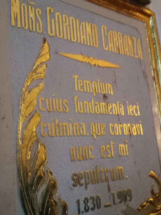 Lápida del ilustre sr. canónigo don Gordiano Carranza, en la parroquia de San Felipe, León, Nicaragua.